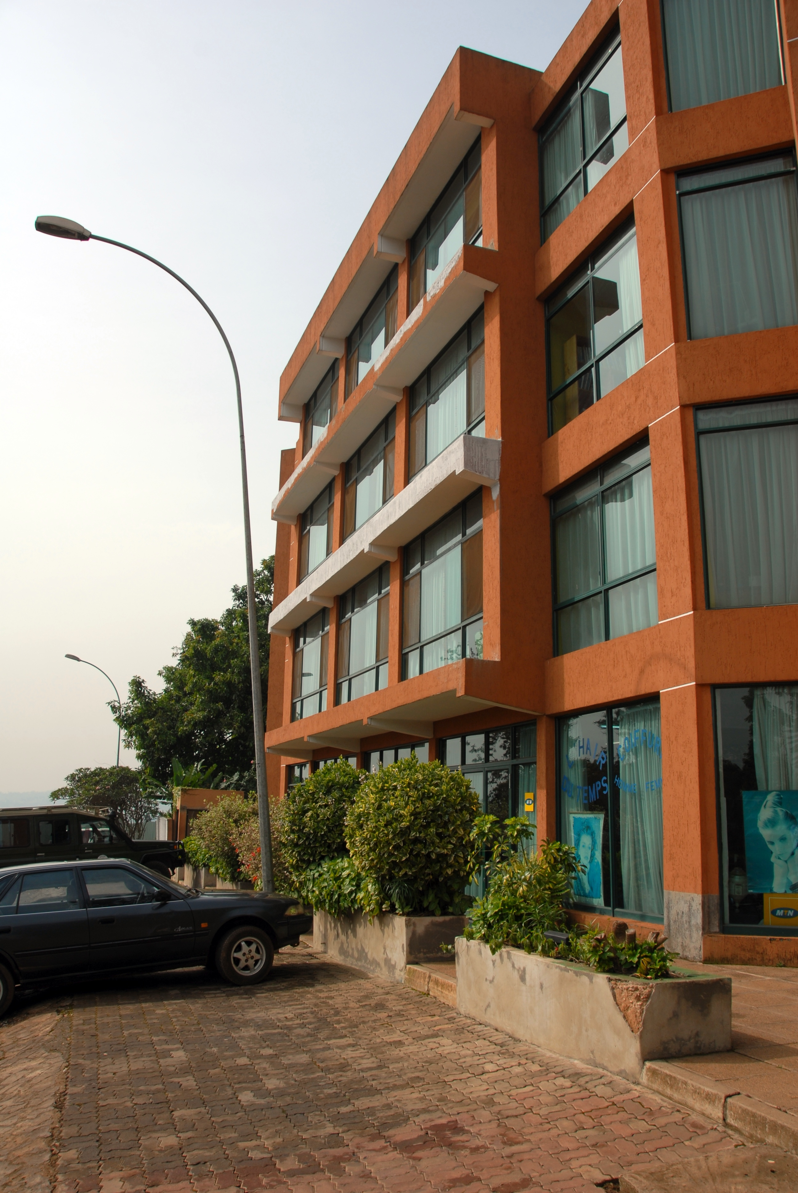 Hotel Gorillas, Kigali